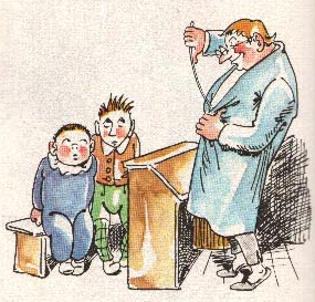 Zeichnung aus Wilhelm Buschs "Plisch und Plum"